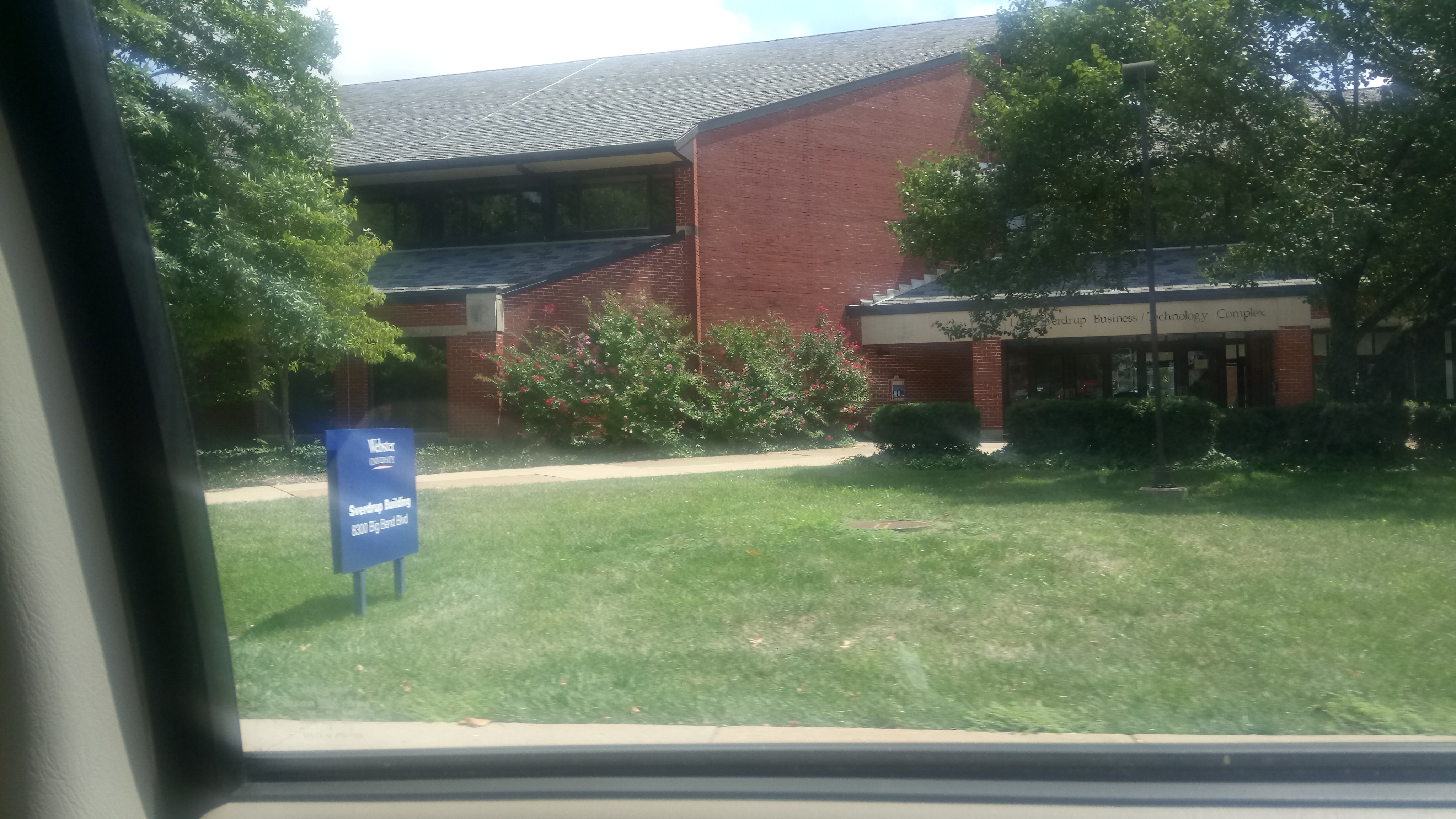 Svedrup Building